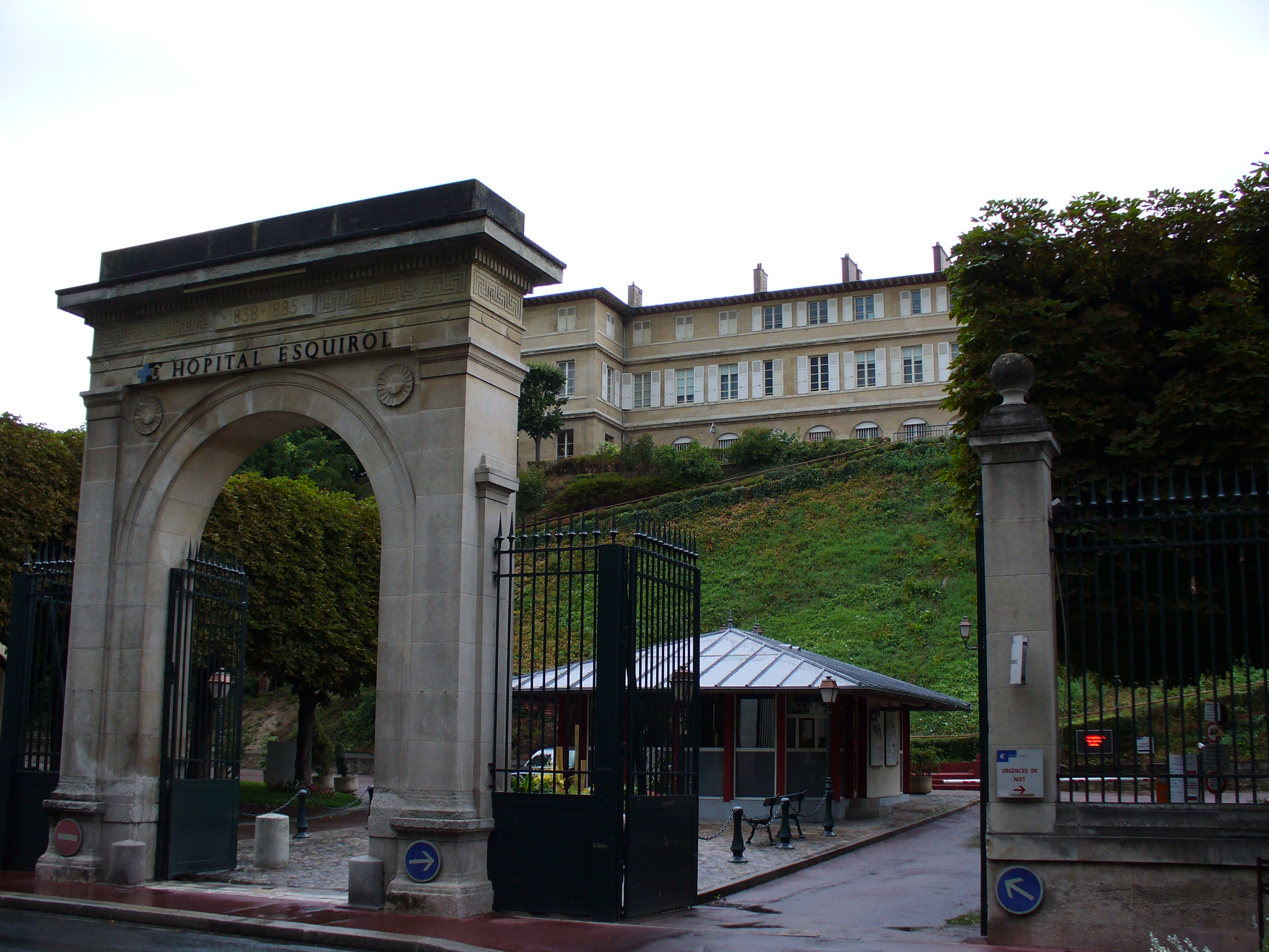 Entrée de l'hôpital Esquirol. Saint-Maurice (Val-de-Marne, France).